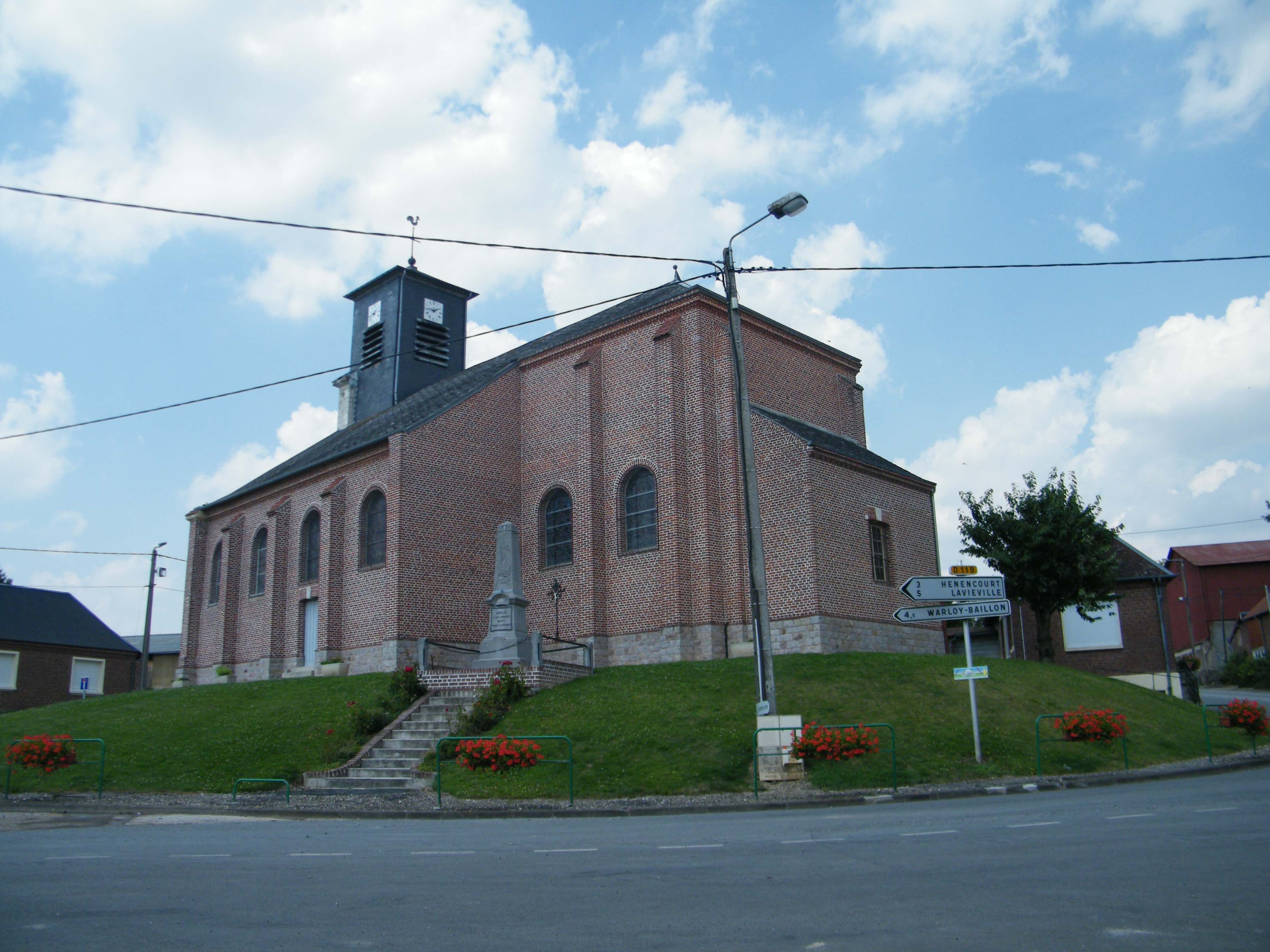 église.